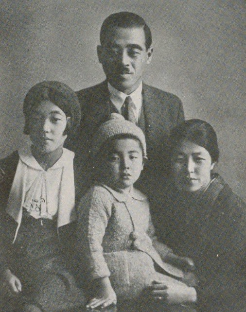 金森次郎、妻岸子、長男昭、長女初子